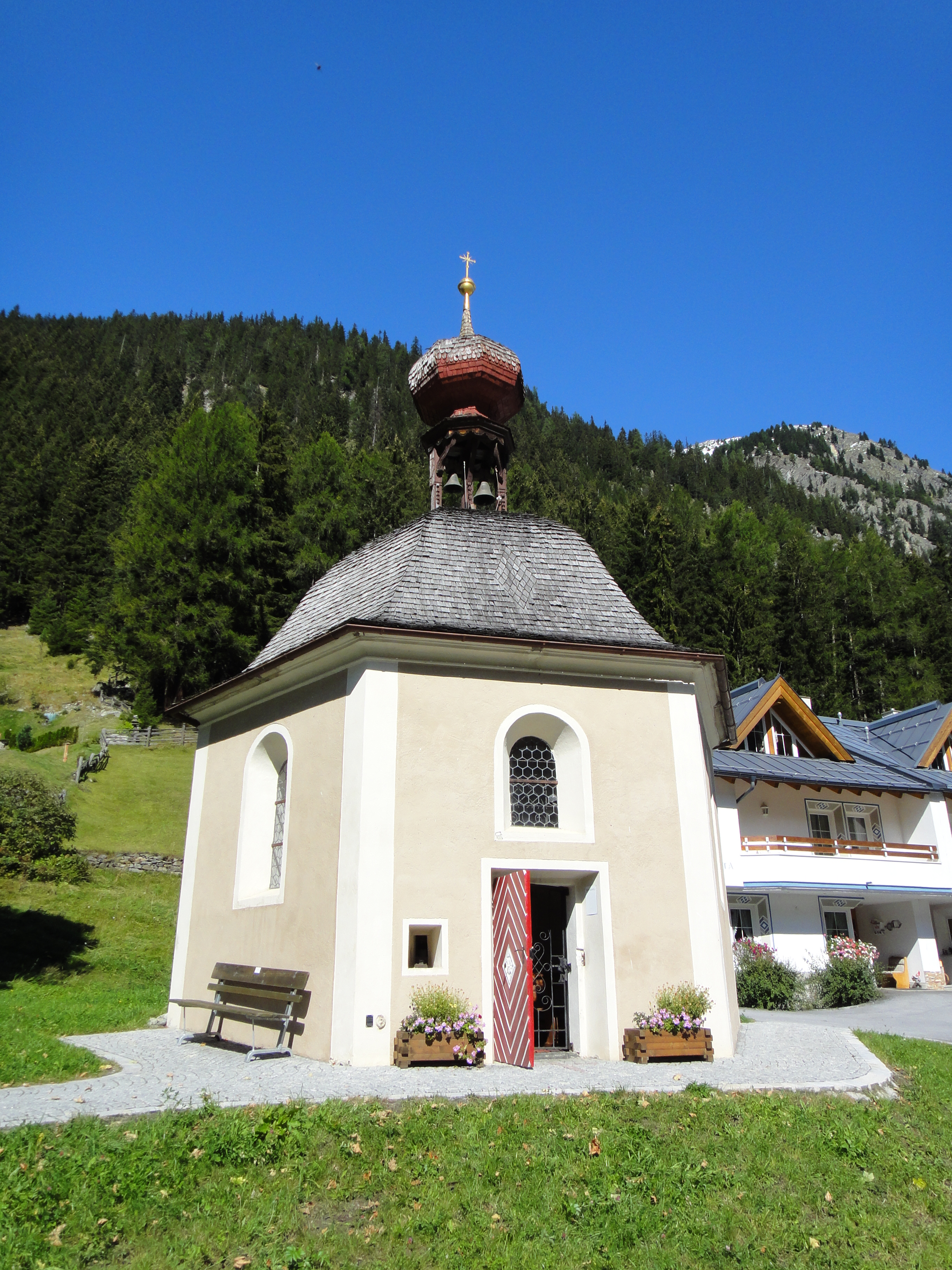 Kapelle Hl. 3 Könige, Mathon, Ischgl, Tirol